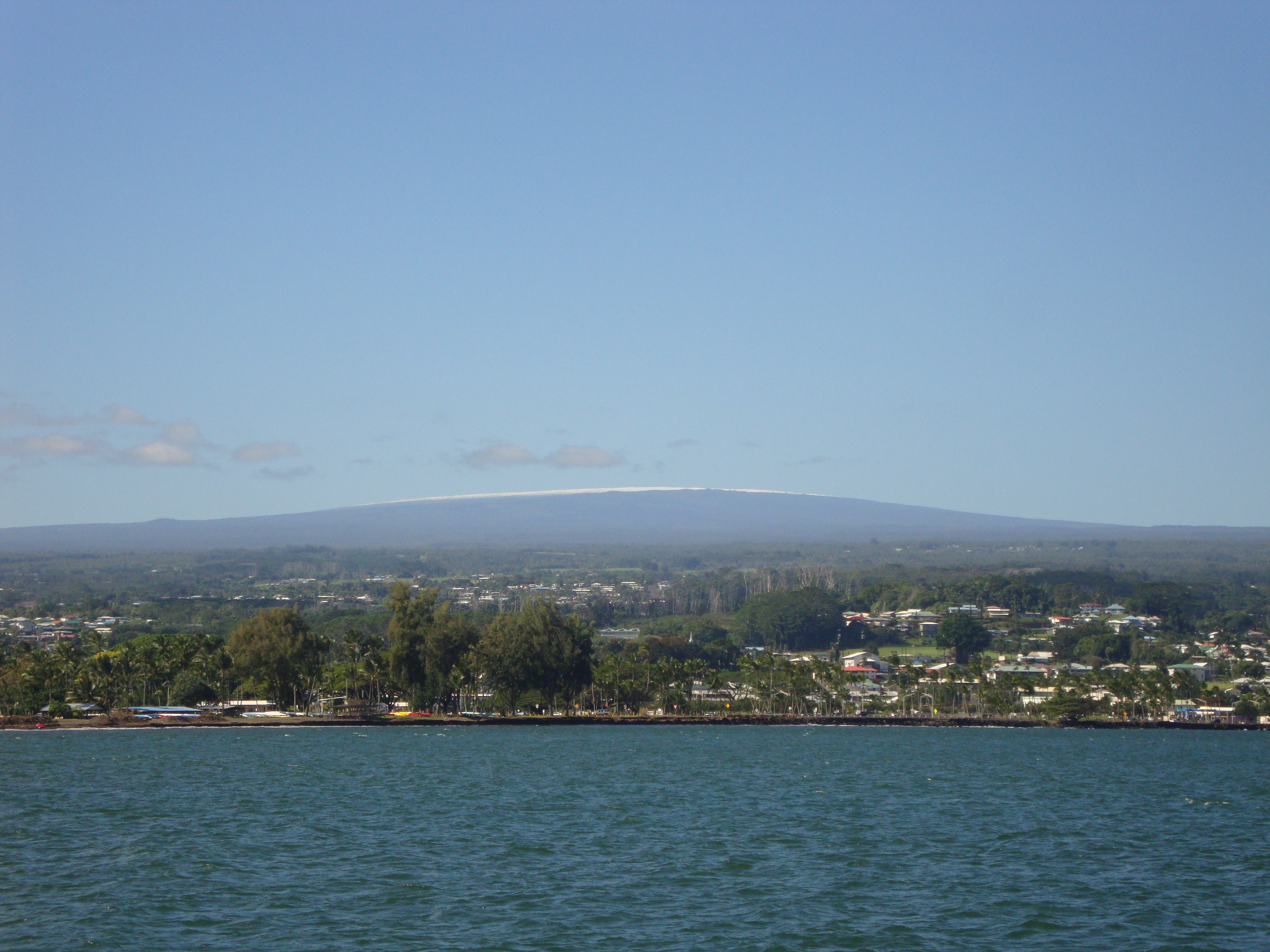 Mauna Loa